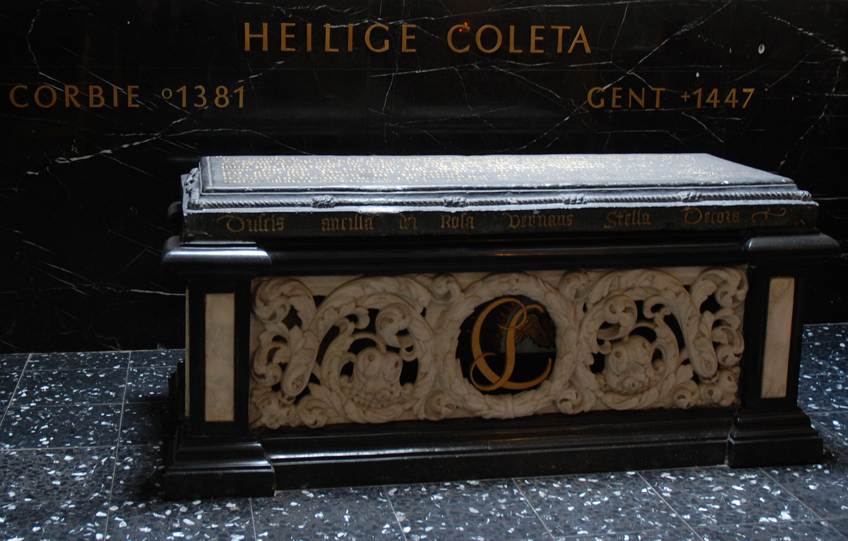 de marmeren grafsteen (1536) van de heilige Coleta (Nicolette Boëllet) in het Monasterium Bethlehem te Gent, België